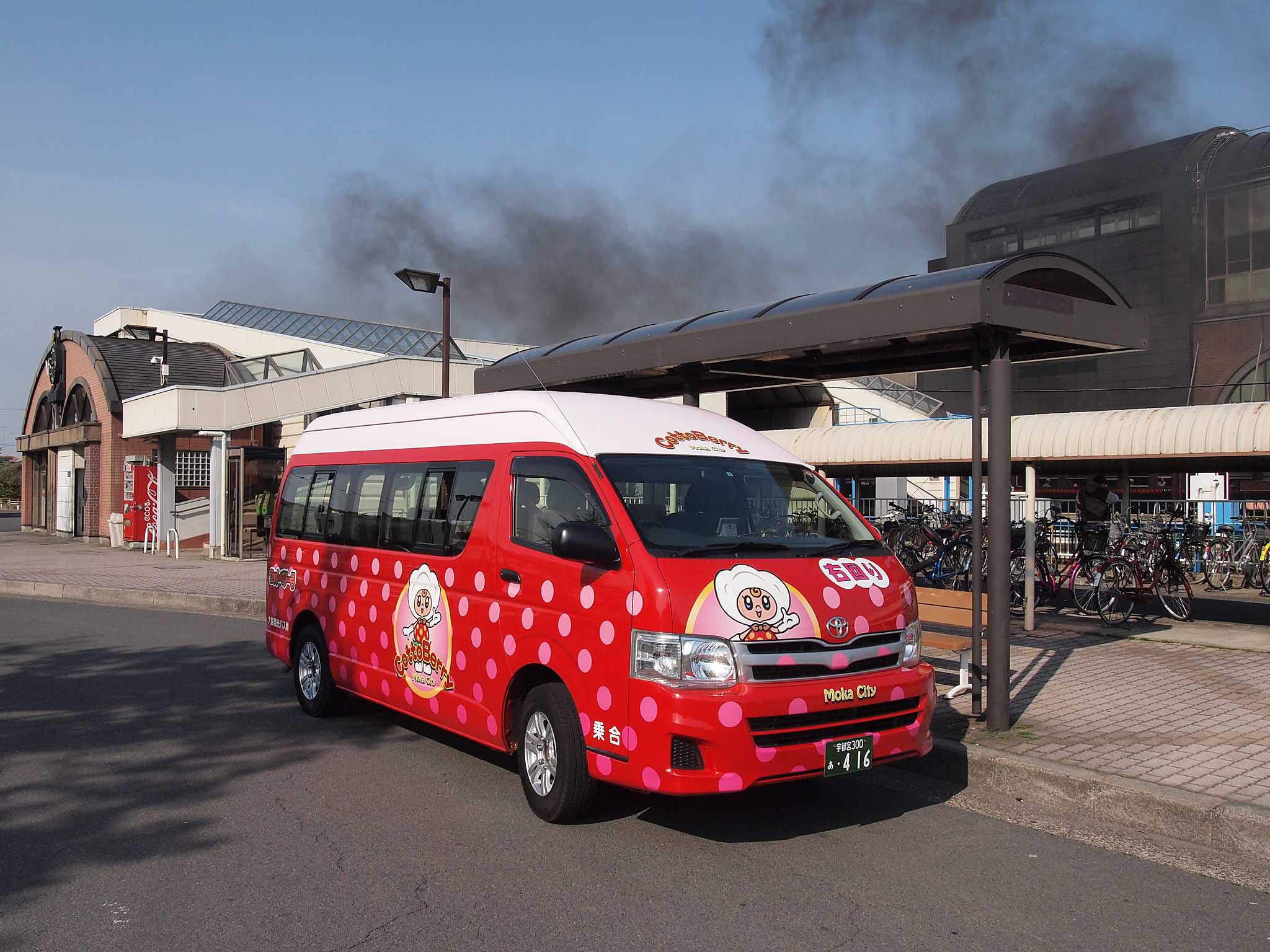 大越観光バスが運行する栃木県真岡市のコミュニティバス「コットベリー号」のトヨタ・ハイエース。 登録番号：宇都宮200あ・416 撮影地：栃木県真岡市、真岡駅西口